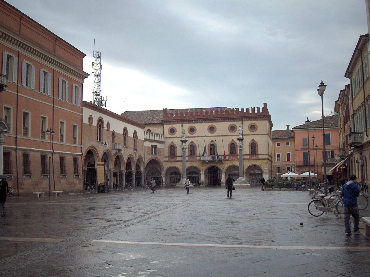 Palazzetto Veneziano (15th c.), Piazza del Popolo, Ravenna, Italy